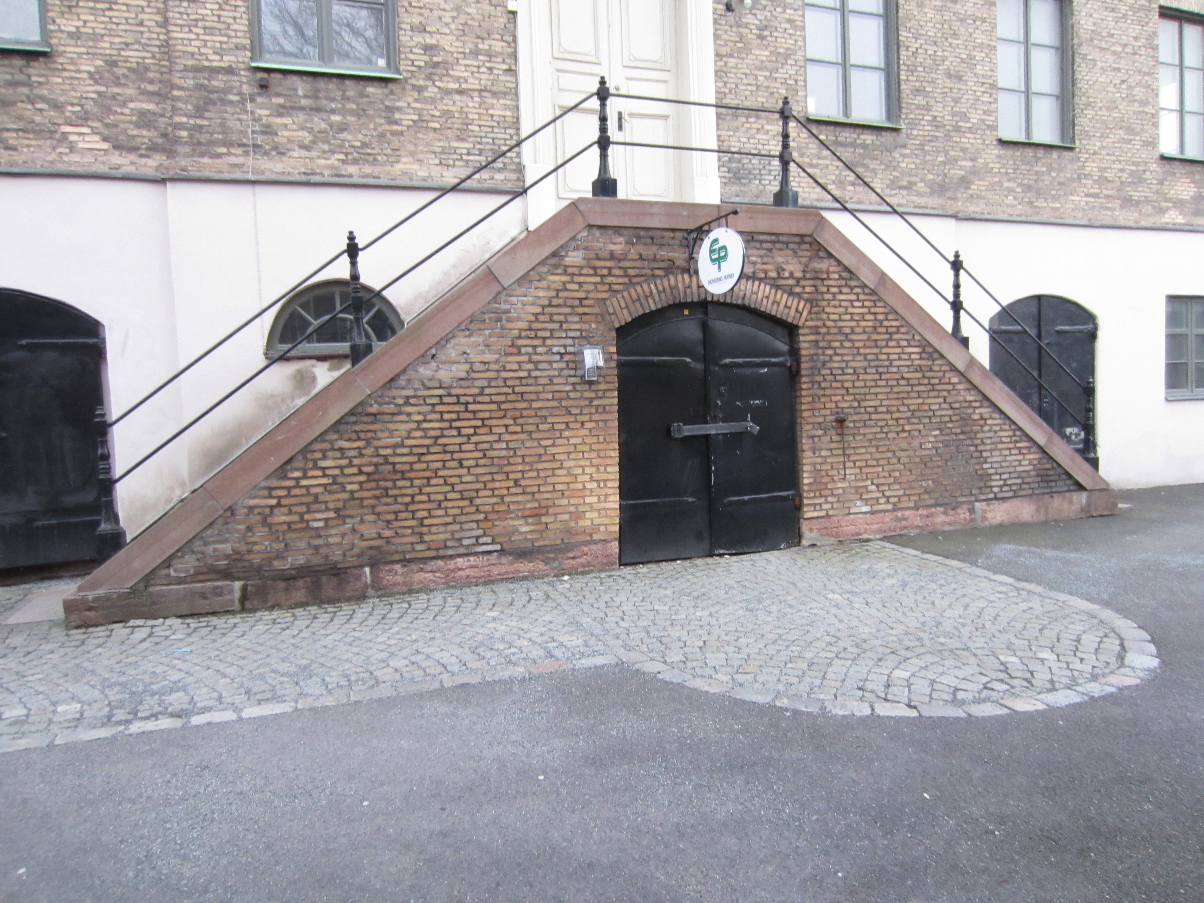 Entréfasaden mot norr har en hög dubbeltrappa, som är uppmurad med ett tegelvalv.